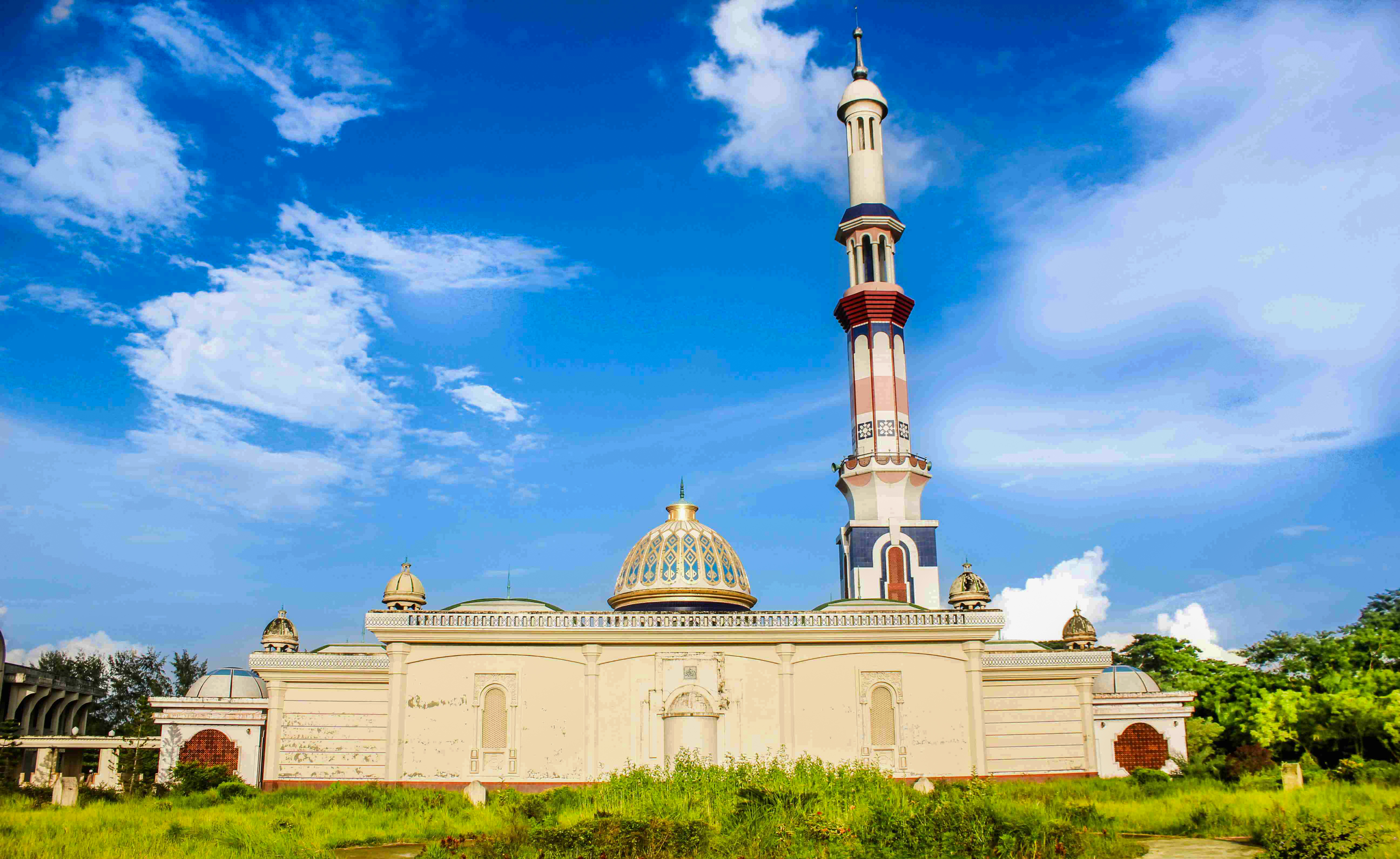 বাইতুল আমান জামে মসজিদ